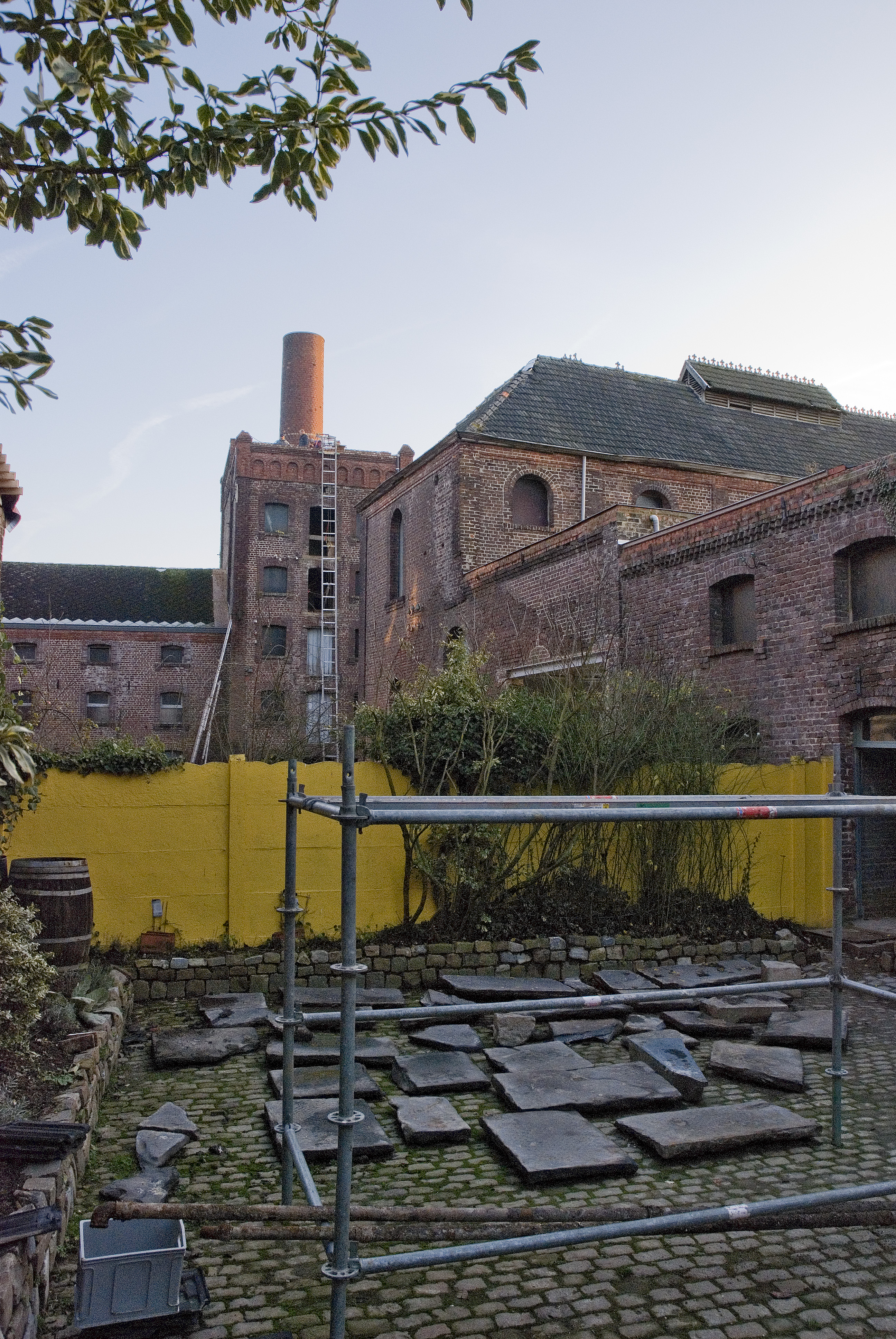 Mouttoren van de voormalige brouwerij Hayen te Ulbeek, Wellen, België